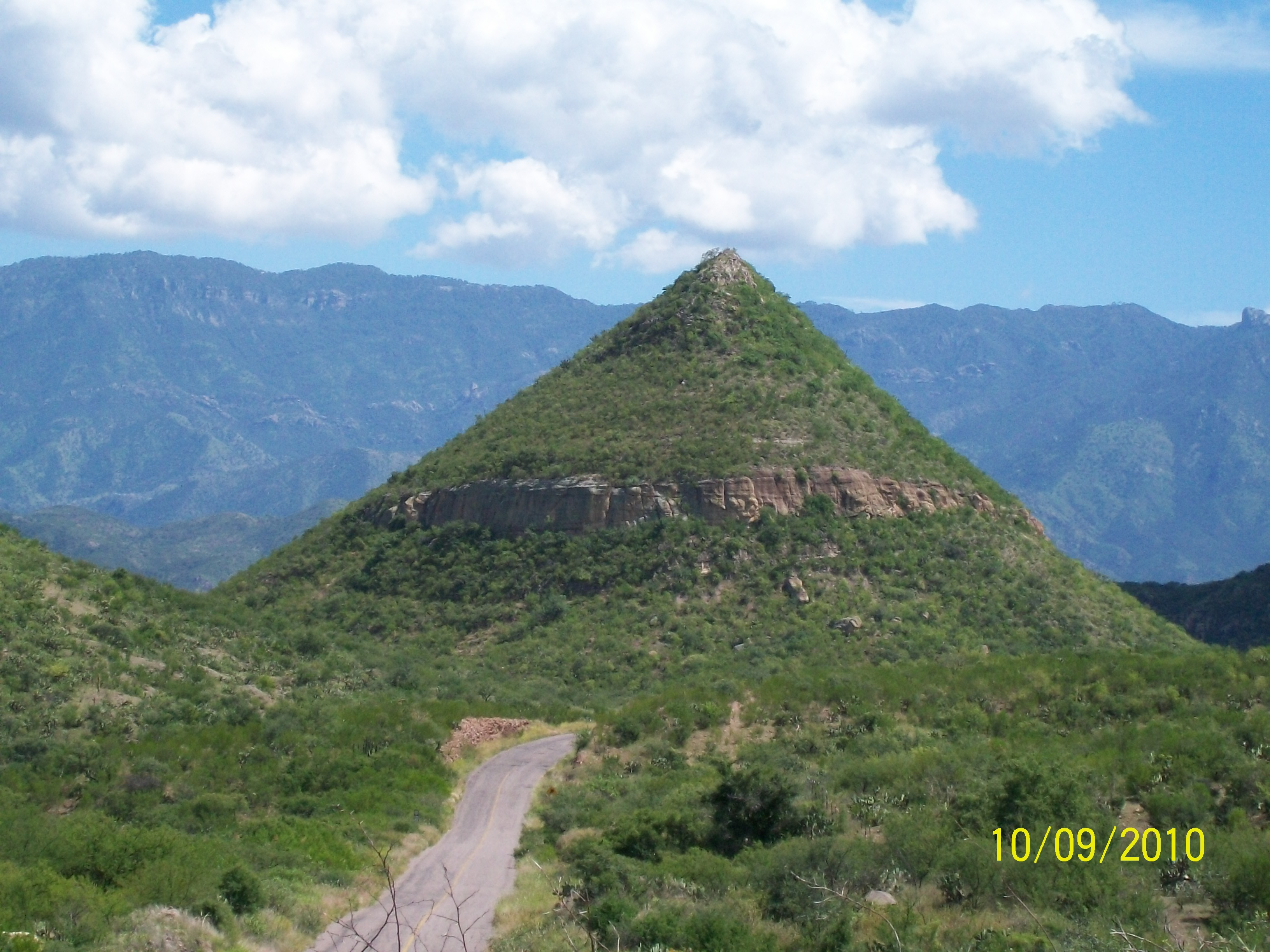 La Pirinola